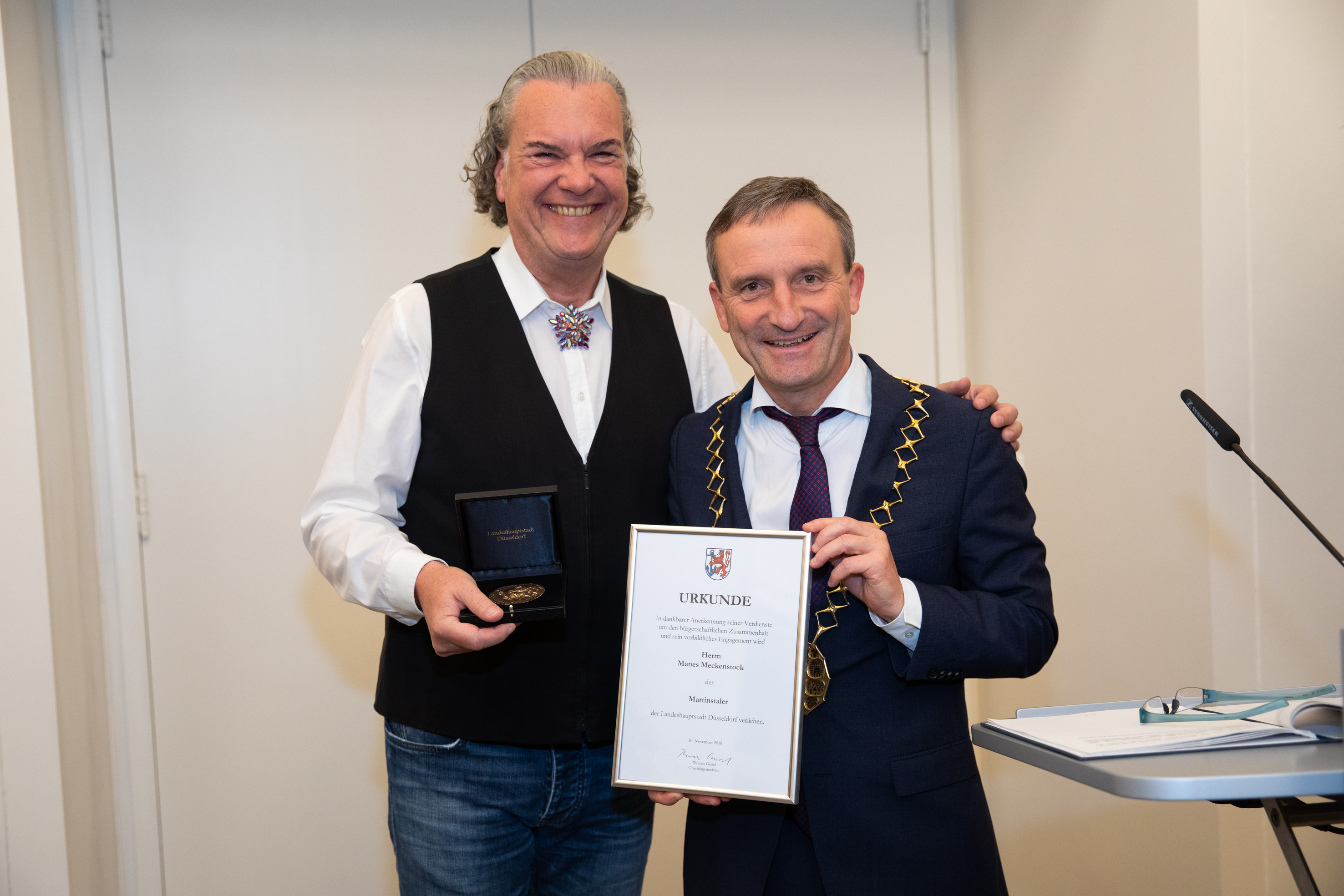 Kabarettist Manes Meckenstock, Träger des Martinstalers 2018, mit Düsseldorfs Oberbürgermeister Thomas Geisel, fotografiert von Melanie Zanin/Stadt Düsseldorf